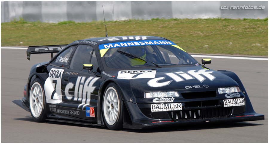 Cliff Calibra